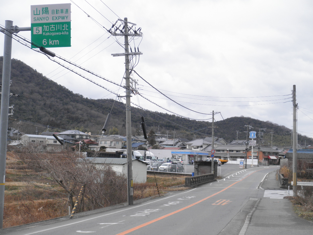 兵庫県加古川市平荘町小畑石原 兵庫県道65号神戸加古川姫路線